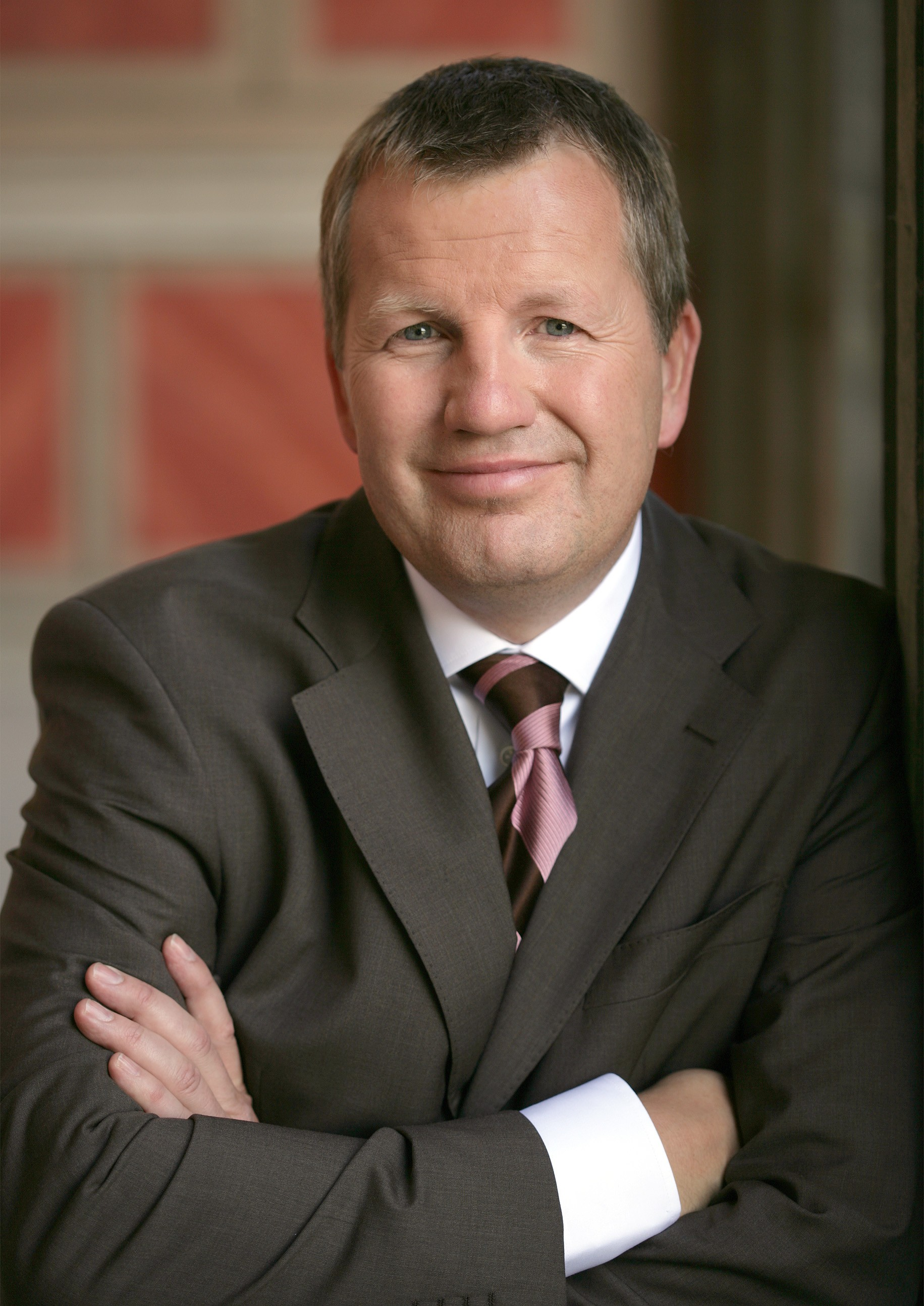 Der Niedersächsische Minister für Kultur und Wissenschaft Lutz Stratmann